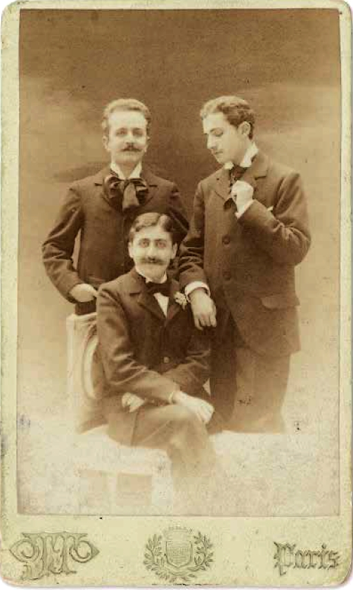 Marcel Proust avec Robert de Flers et Lucien Daudet, vers 1896. Photo-carte de visite sur carton d'Otto Wegener, collection Suzy Mante-Proust, N°168 vente Sotheby's, Paris 31 mai 2016.